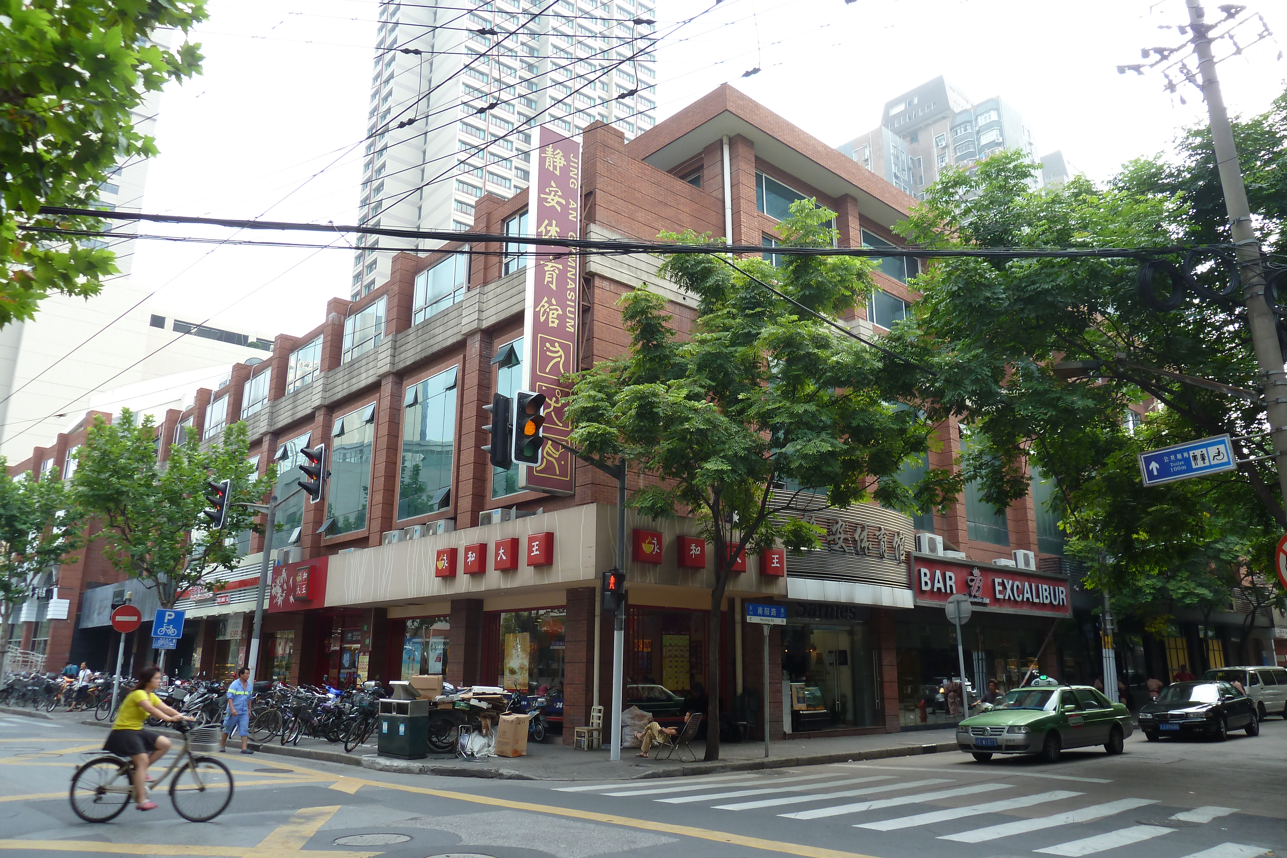 上海南陽路會所（現被改設為「靜安體育館」）